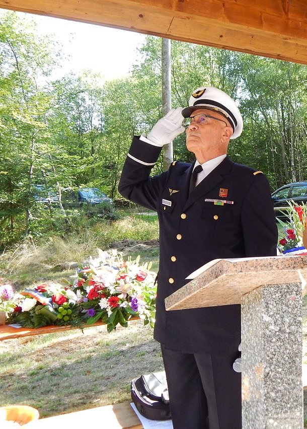 3èm Président